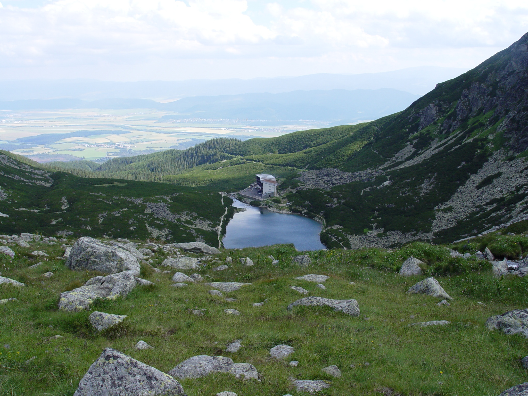 Magas-Tátra,_Lengyel-nyeregről_lefelé,_Felkai-völgy_A_Sziléziai_házzal